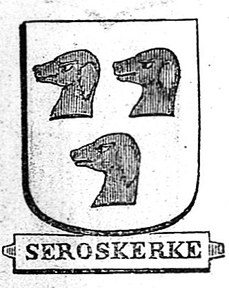 PRAENOBLIS Familia ex Belg.